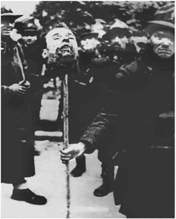 Militi fascisti esibiscono come trofeo la testa di un partigiano sloveno. Medio Isonzo, autunno 1942.